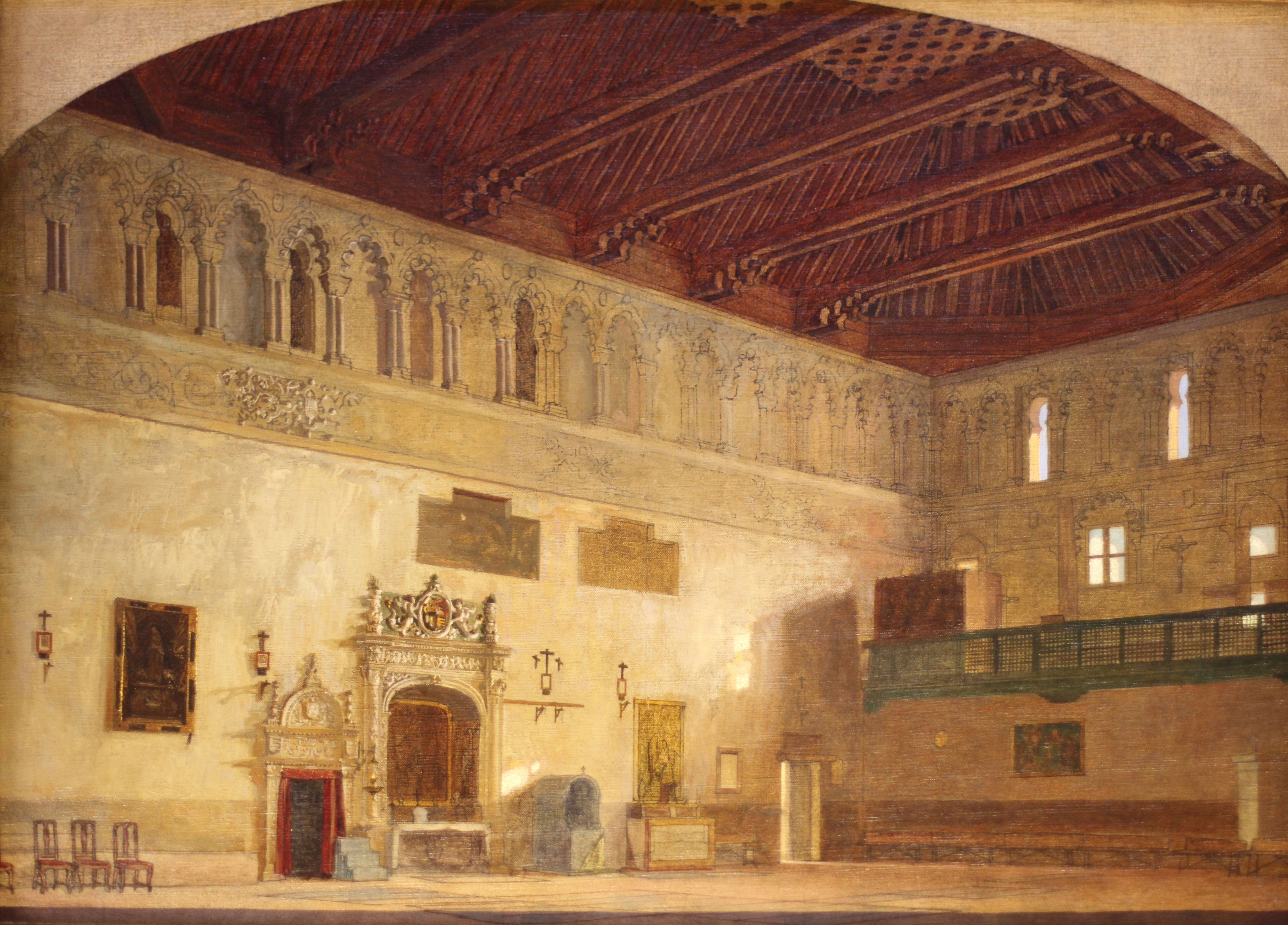 Interior de la iglesia de San Benito (Sinagoga del Tránsito)